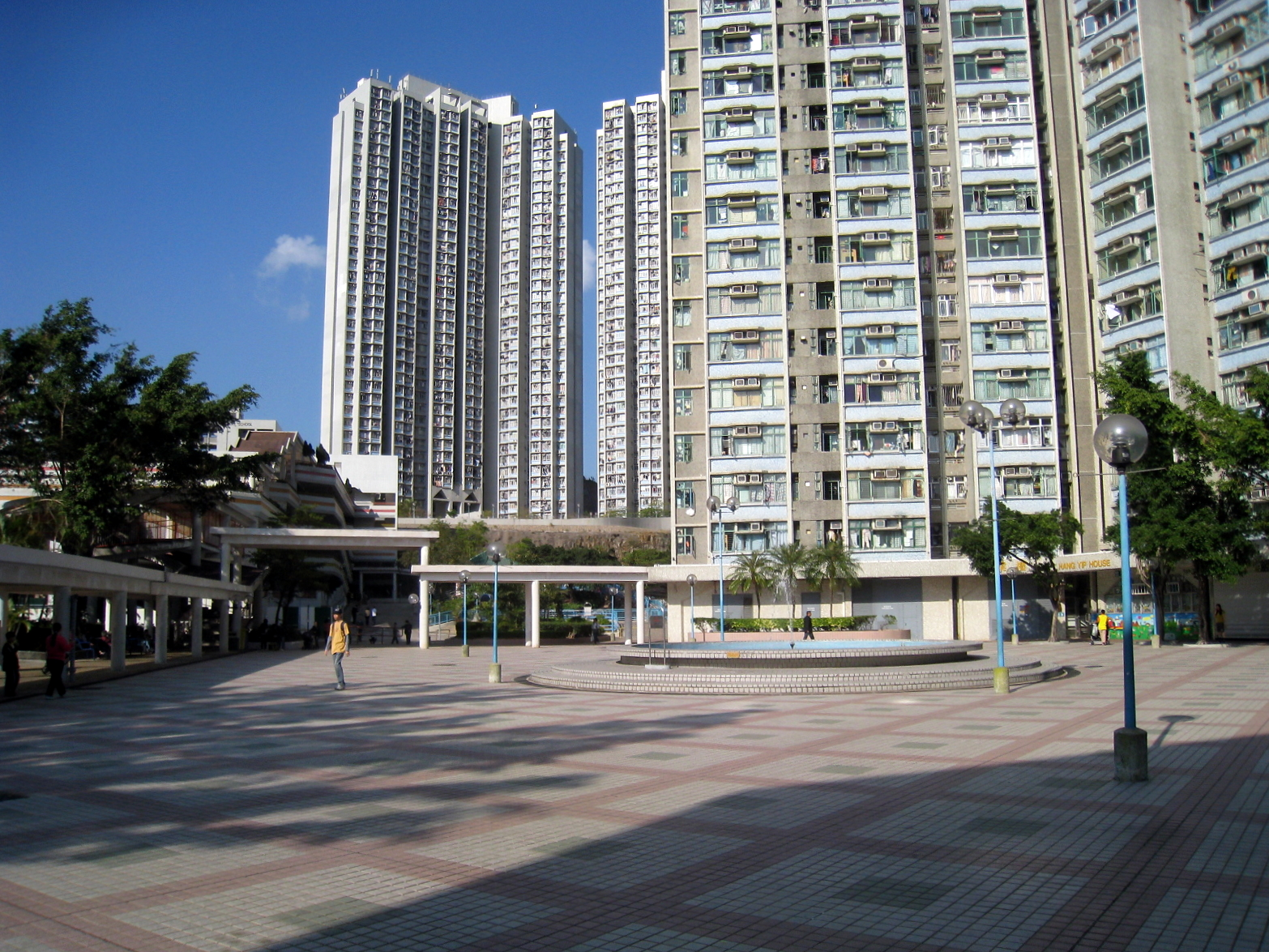 Cheung Hang Estate 長亨邨